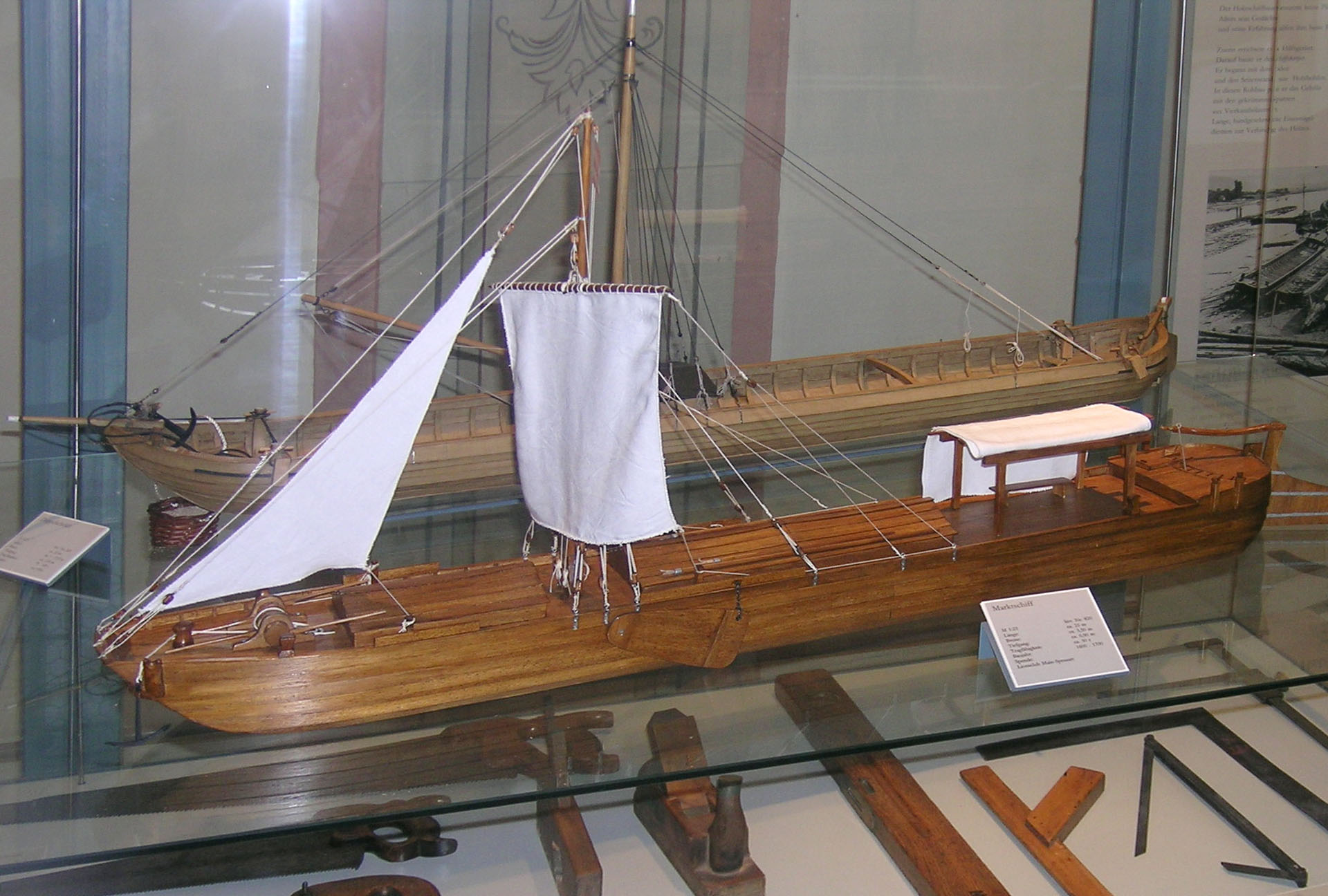 Schifffahrts- und Schiffbaumuseum Wörth am Main (Vitrine mit Marktschiff und Werkzeugen zur Holzbearbeitung)